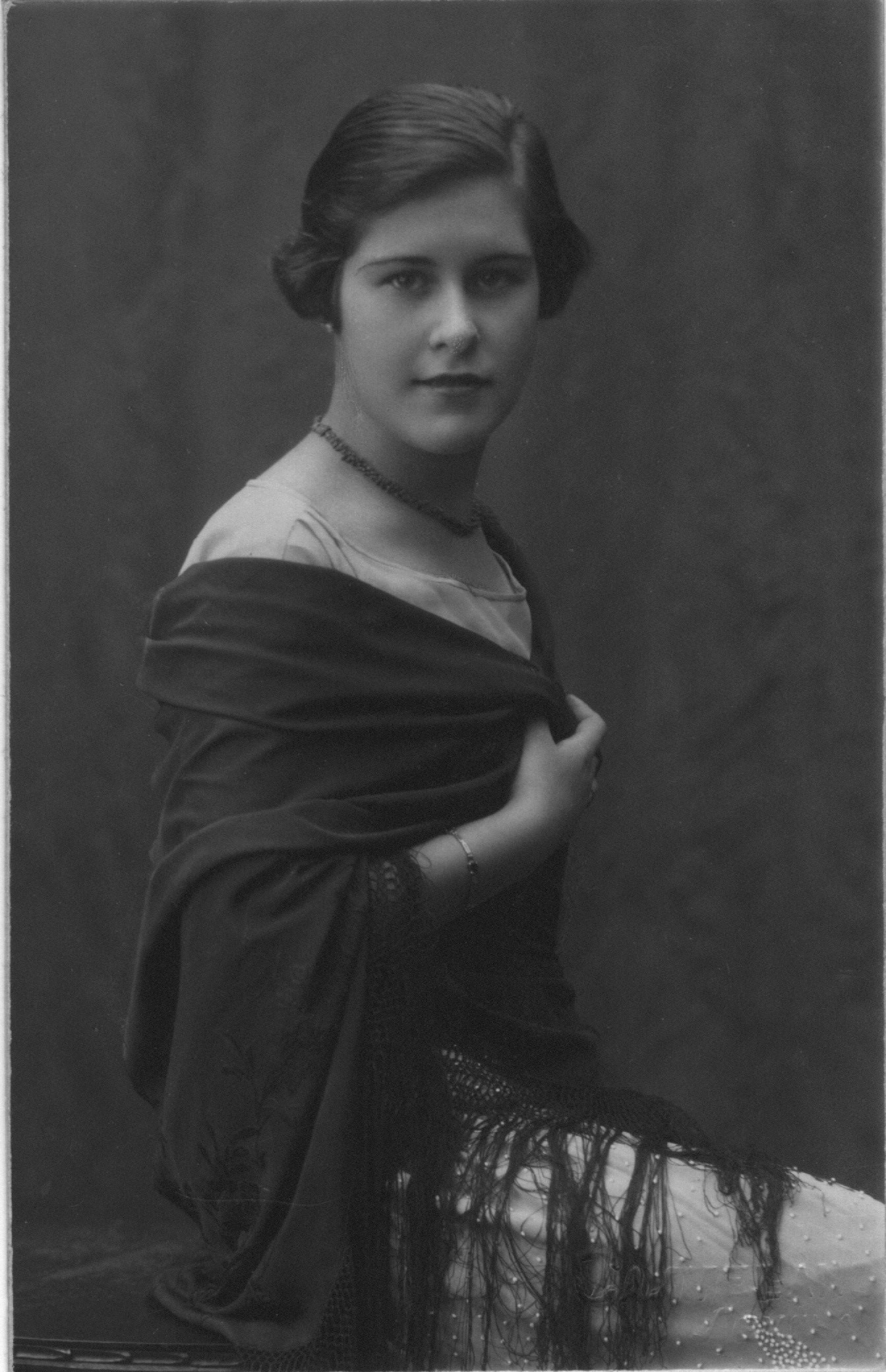 Retrato fotográfico de la Marquesa de Mirabal a finales de los años '20 del siglo XX